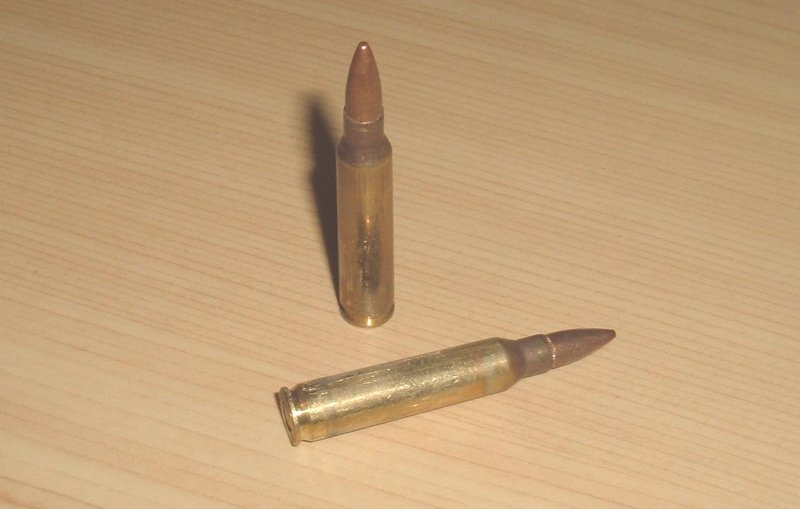 כדורי 5.56 מ"מ.